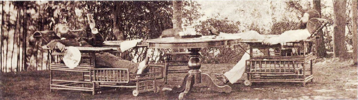 Curt Adolph Netto (* 21. August 1847 in Freiberg; † 7. Februar 1909 in Frankfurt am Main) war ein deutscher Metallurge und Autor. Er gilt als Wegbereiter für die industrielle Nutzbarmachung des Aluminiums. links: Erwin von Bälz (* 13. Januar 1849 in Bietigheim (Württemberg); † 31. August 1913 in Stuttgart) war ein deutscher Internist, Anthropologe und Leibarzt der Kaiserlichen Familie von Japan. Gemeinsam mit dem ebenfalls aus Deutschland stammenden Chirurgen Julius Scriba gilt er als Mitbegründer der modernen Medizin in Japan